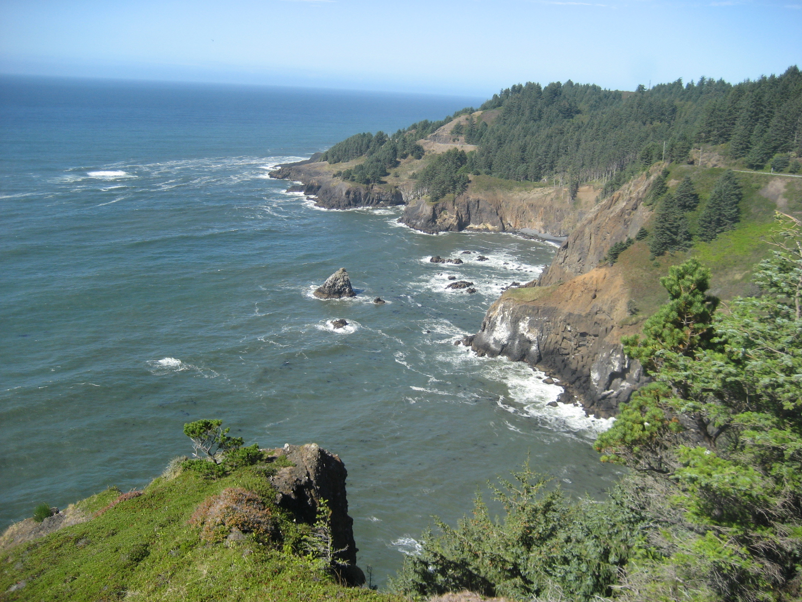 500 feet up